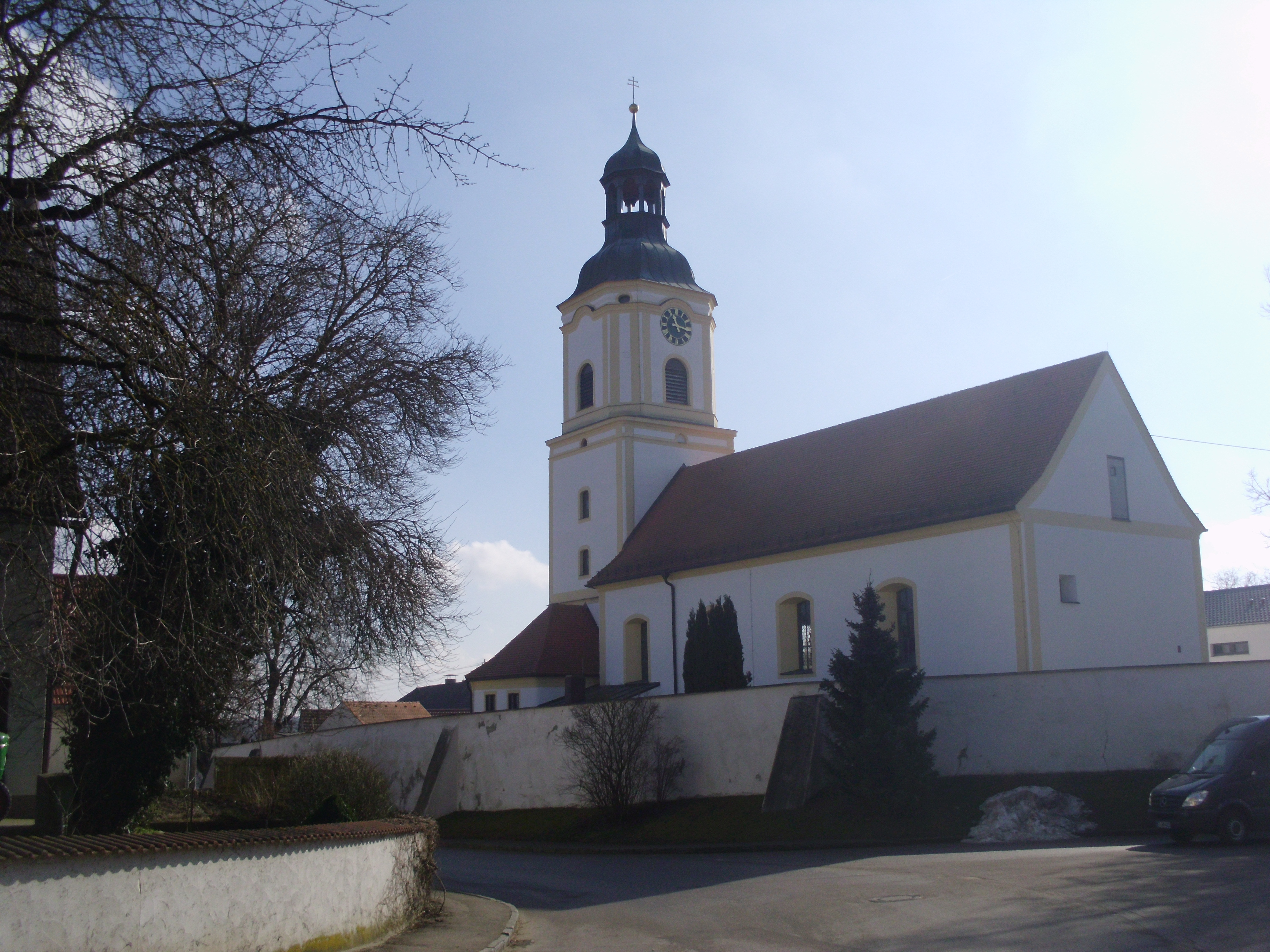 Bergheim, Landkreis Neuburg-Schrobenhausen, Kirche St. Mauritius